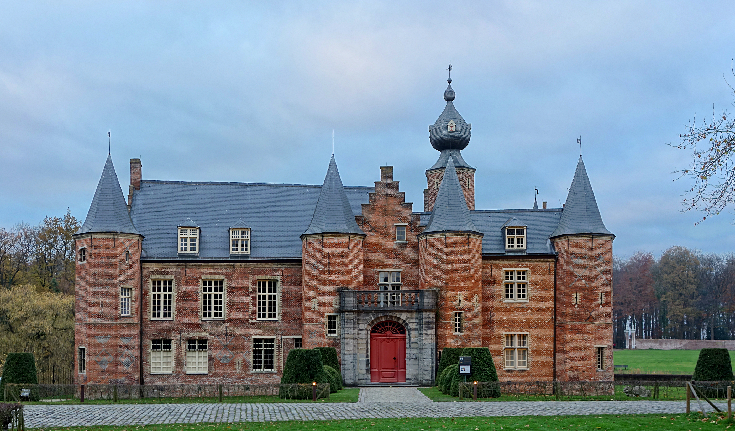 Le château de Rumbeke, Belgique.